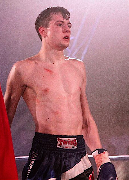 боец по тайскому боксу